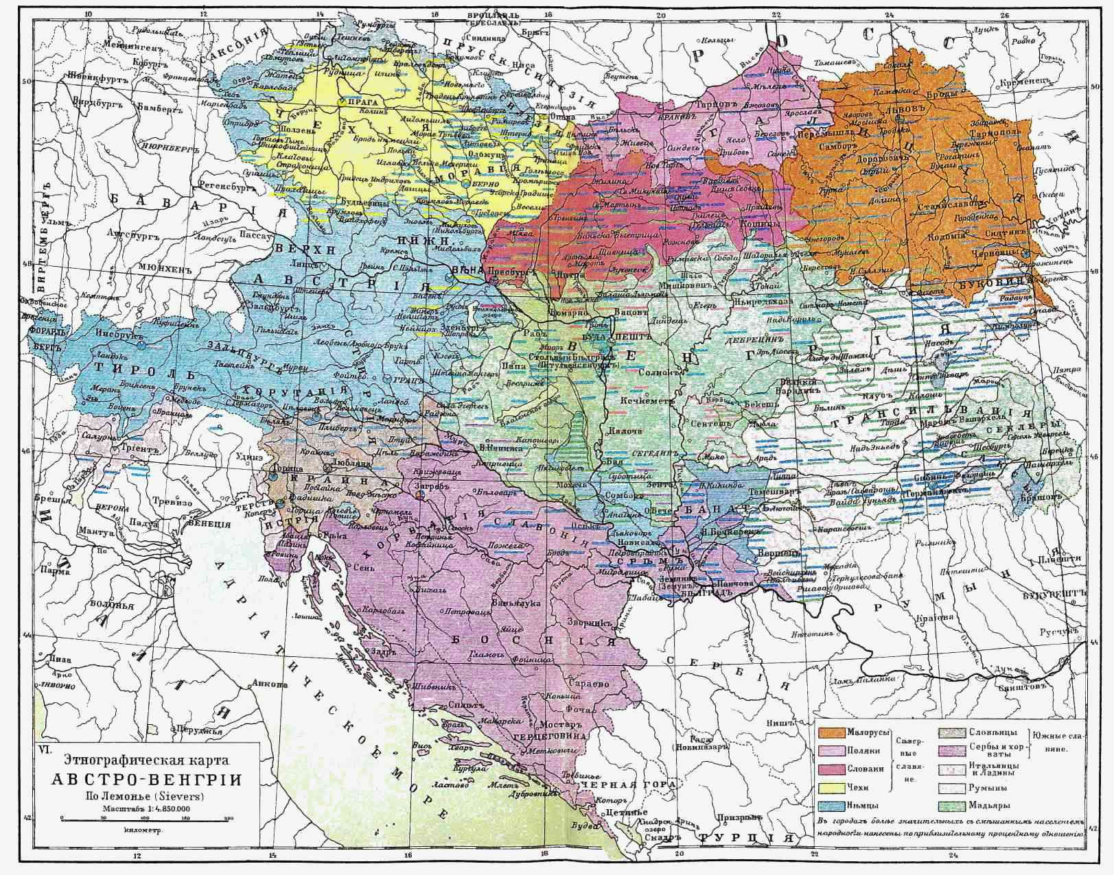 Этнографическая карта Австро-Венгрии. Иллюстрация к статье славяне из энциклопедии Брокгауза и Ефрона